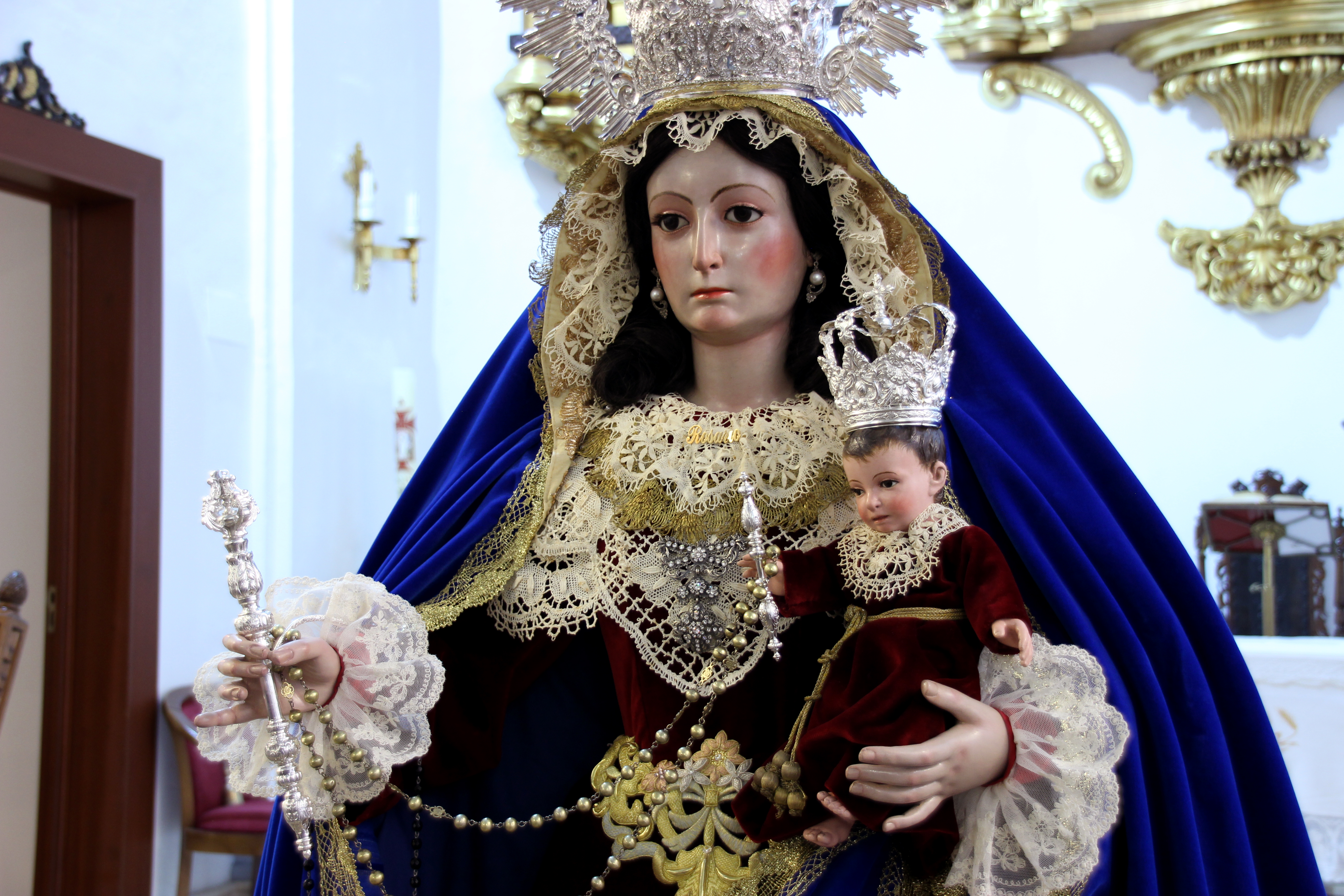 Fotografía de Ntra. Sra. del Rosario, Patrona de El Palo.